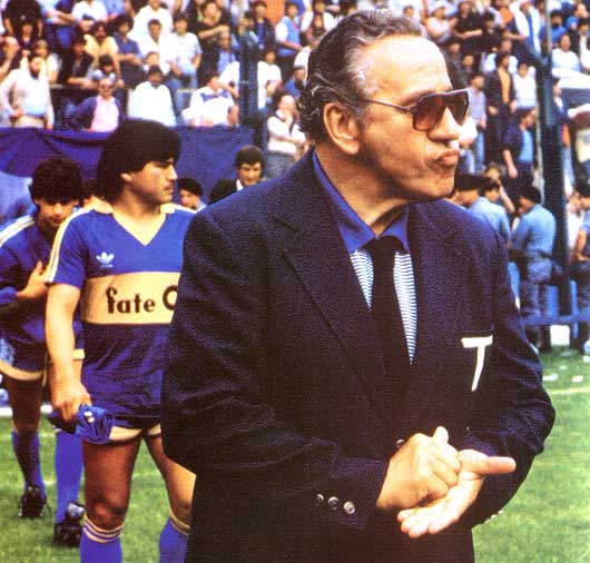 Juan Carlos Lorenzo